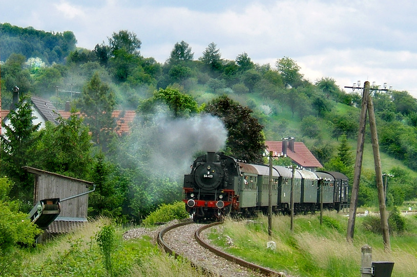 Dampfzug der DBK Historische Bahn mit Lok 64 419 am Mühlentag 2005 kurz vor der Ankunft in Rudersberg-Michelau, Deutschland